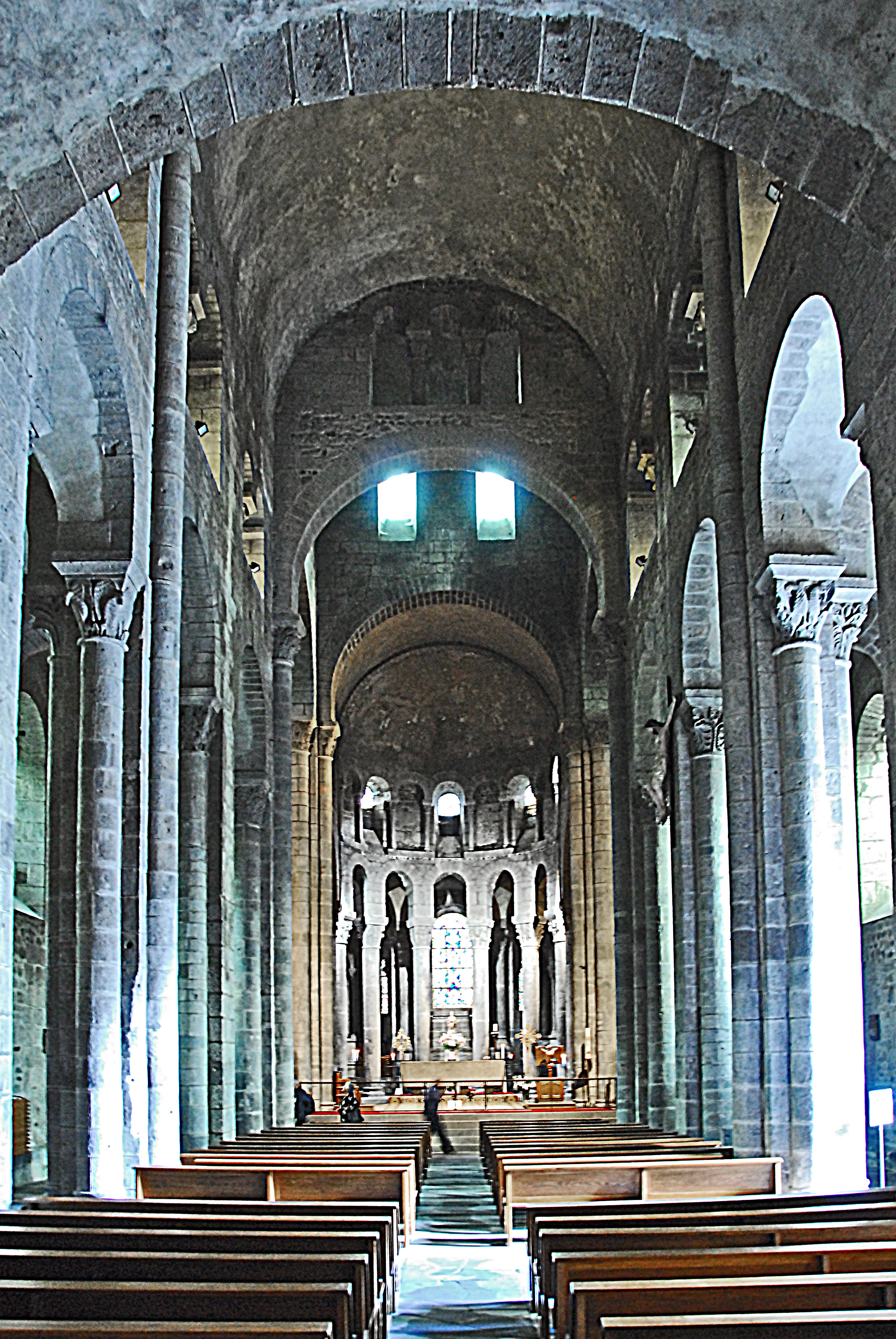 N.-D. d'Orcival, Mittelschiff aus Narthex